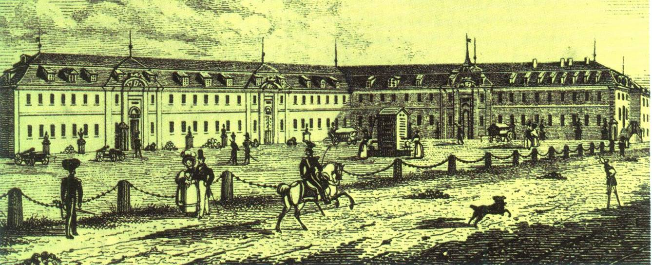 Ludwigsburg: Garde-Kaserne, Reiterkaserne